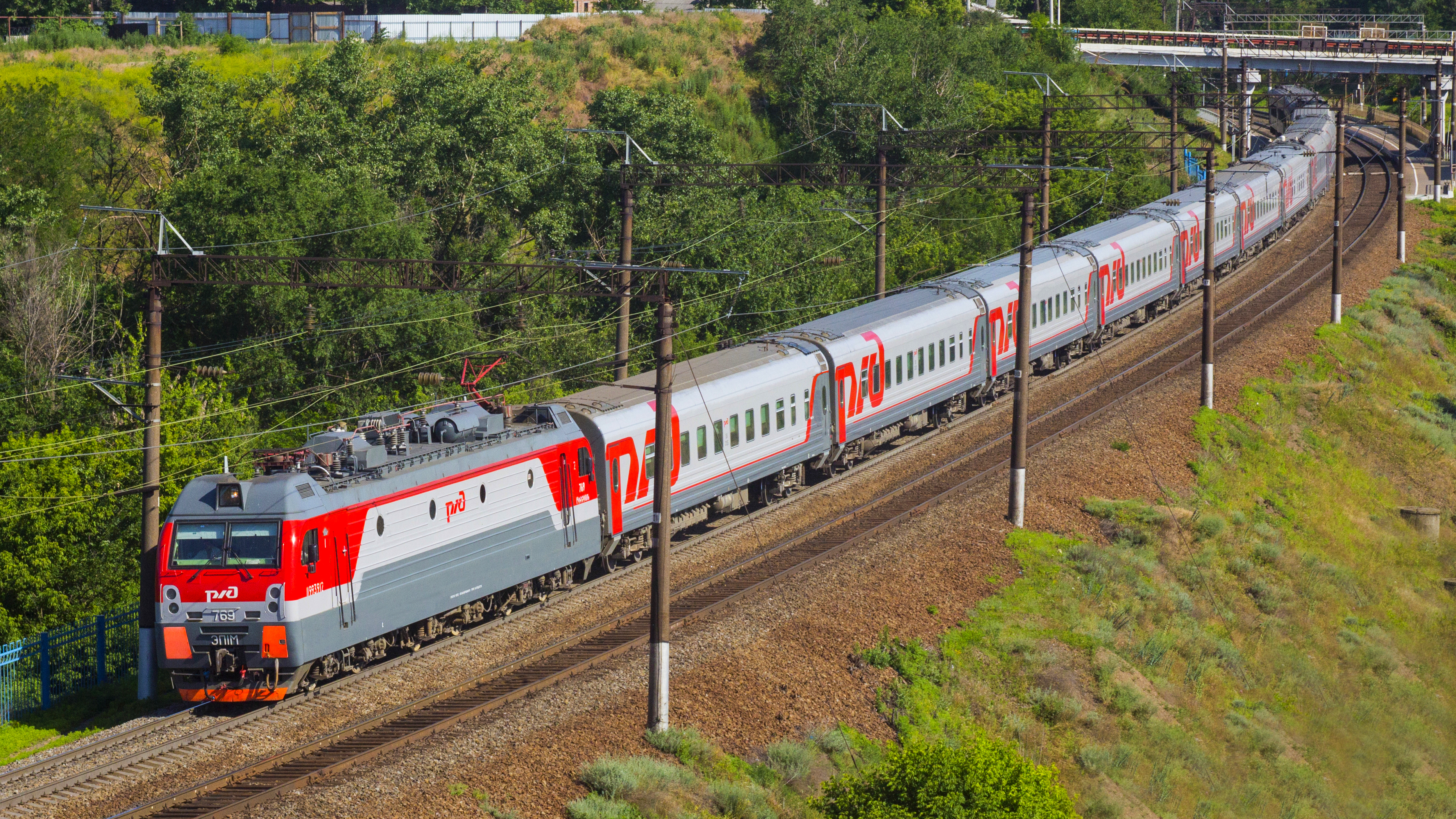 Электровоз переменного тока ЭП1М-769 с фирменным поездом № 62 "Эльбрус" Москва — Нальчик, перегон Кизитеринка - Развилка, участок о. п. Красный Аксай - рзд. Развилка, г. Ростов-на-Дону, Северо-Кавказская железная дорога